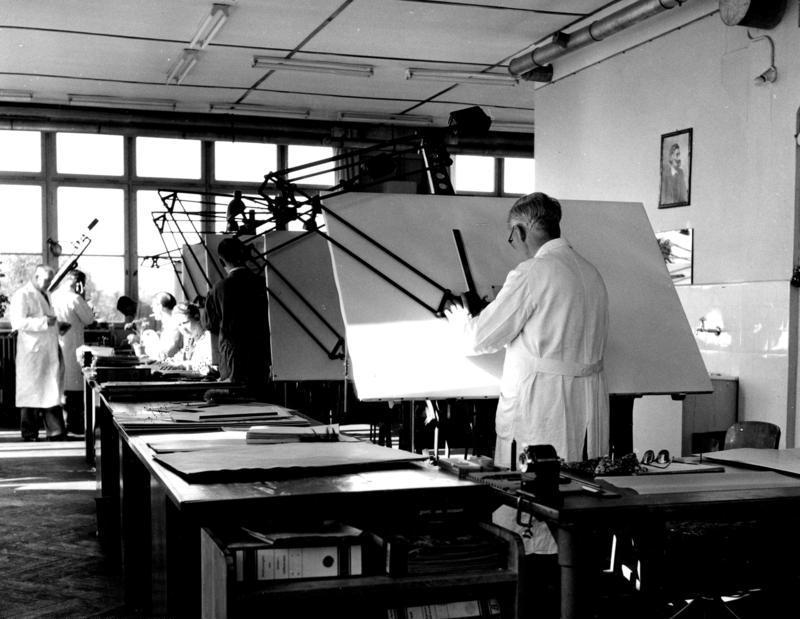 Göttingen Zeiss-Winkel-Werke Opt. Werke Erfahrene Konstrukteure sind ständig bemüht, die Geräte nach den letzten Anforderungen der Wissenschaft zu verbessern und zu vervolkommen